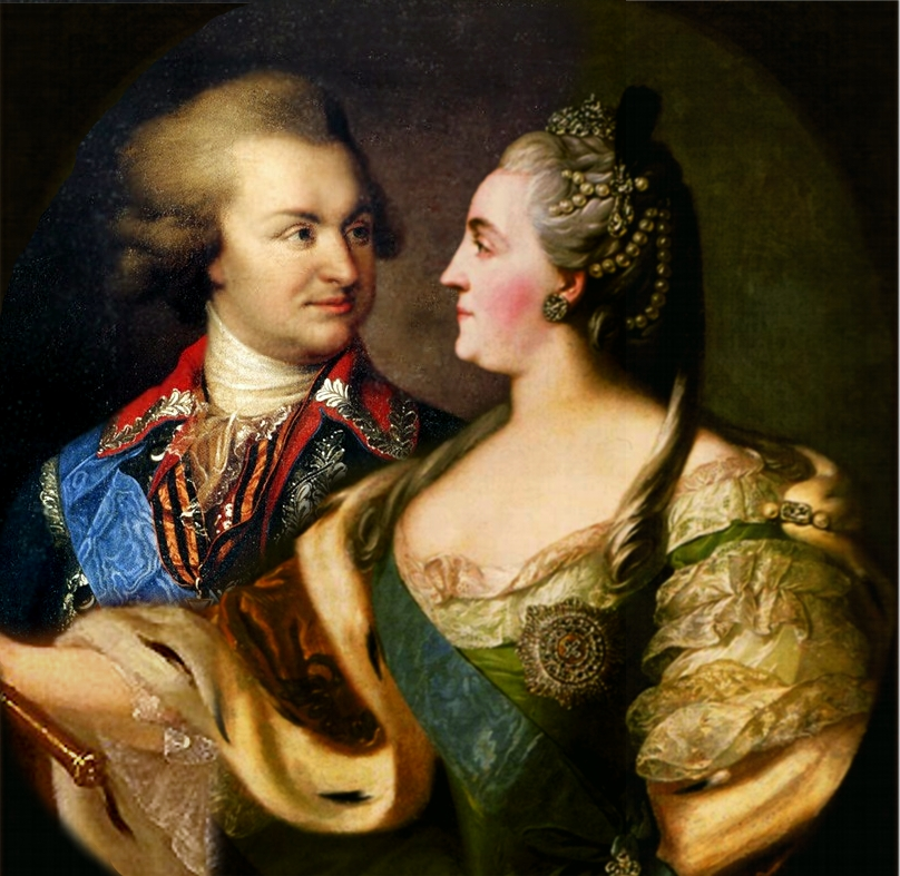 Catherine II and Potemkin. Екатерина II и Потемкин